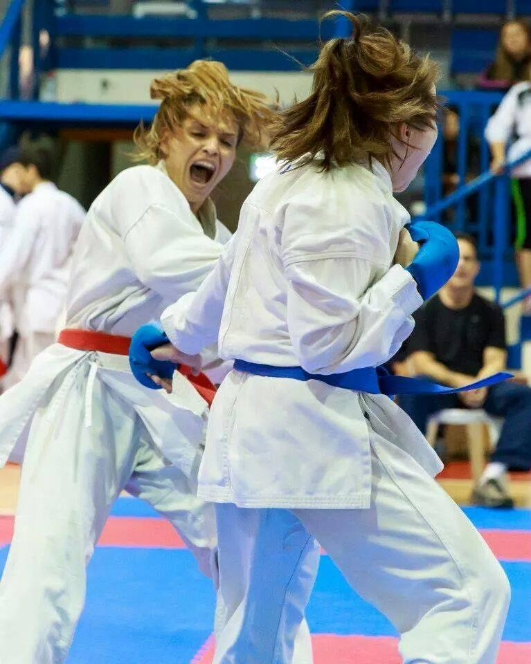 אליפות אירו- אסיה משחקי "איילת" באילת 2014